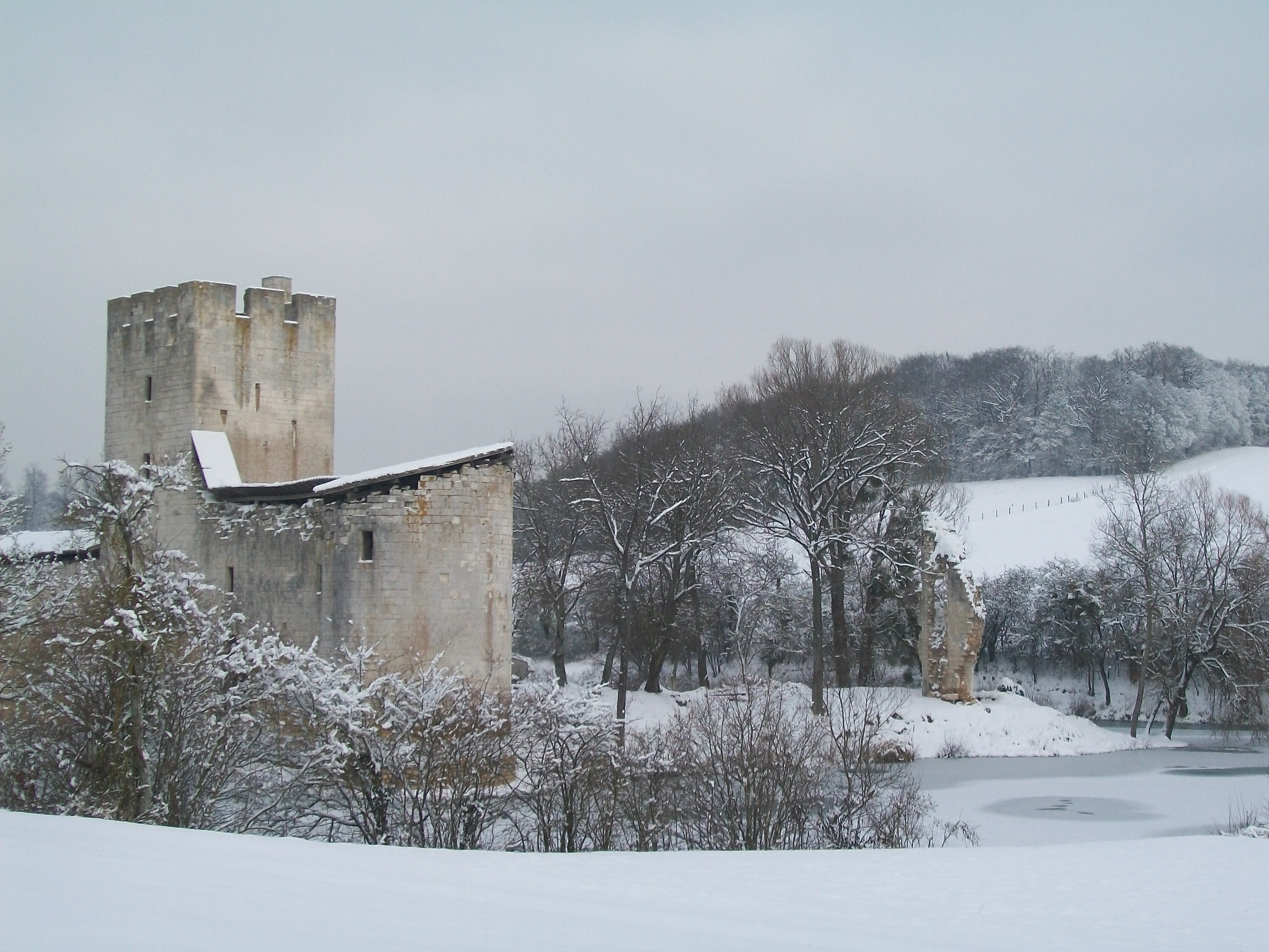 vue extérieure du château sous la neige